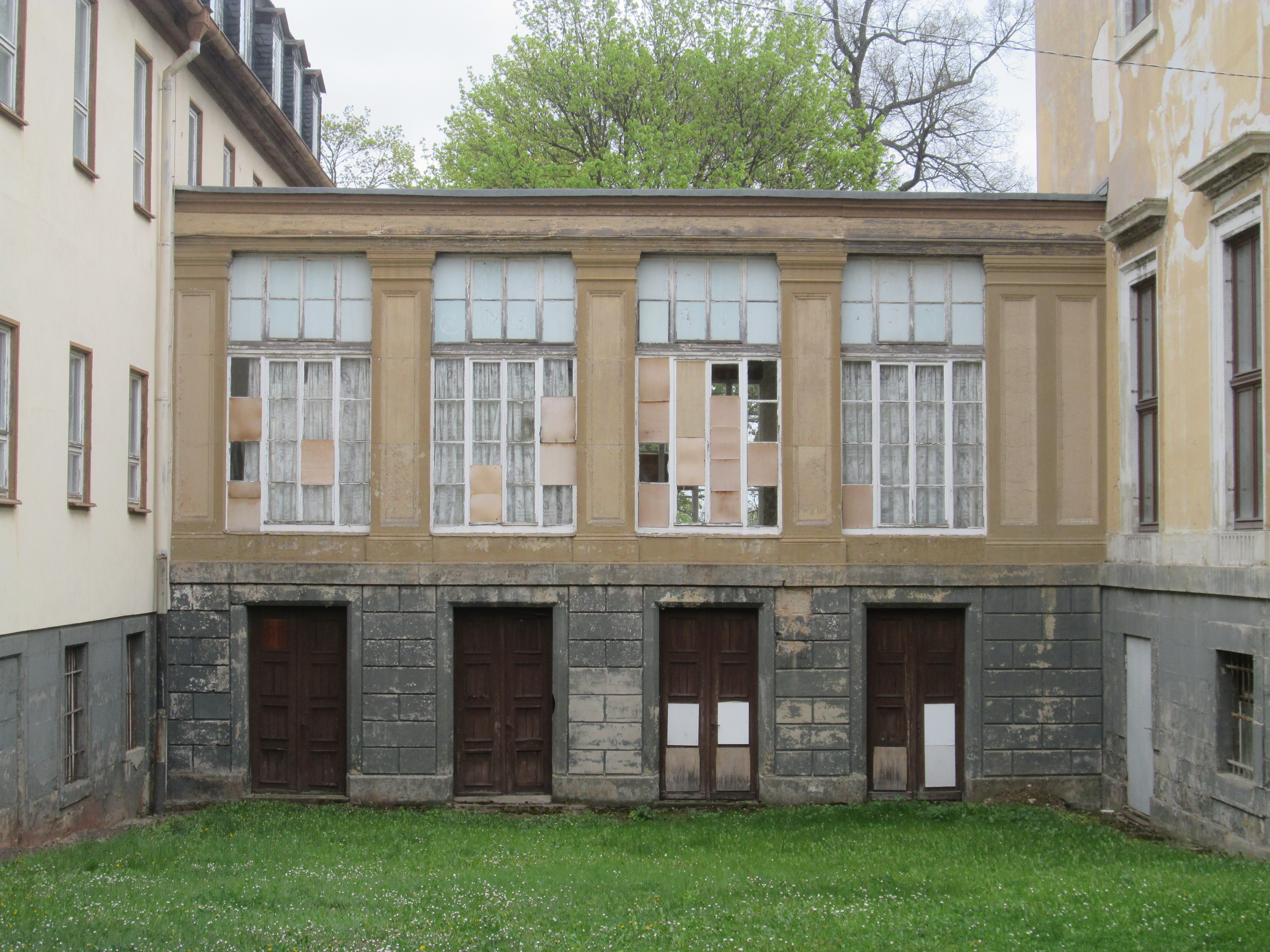 Prinzenpalais Gotha Bild 1